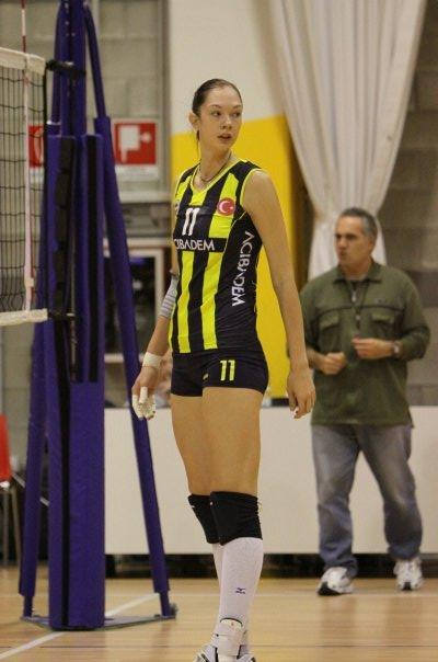 Ekaterina Gamova, pallavolista russa, gioca nel ruolo di opposto